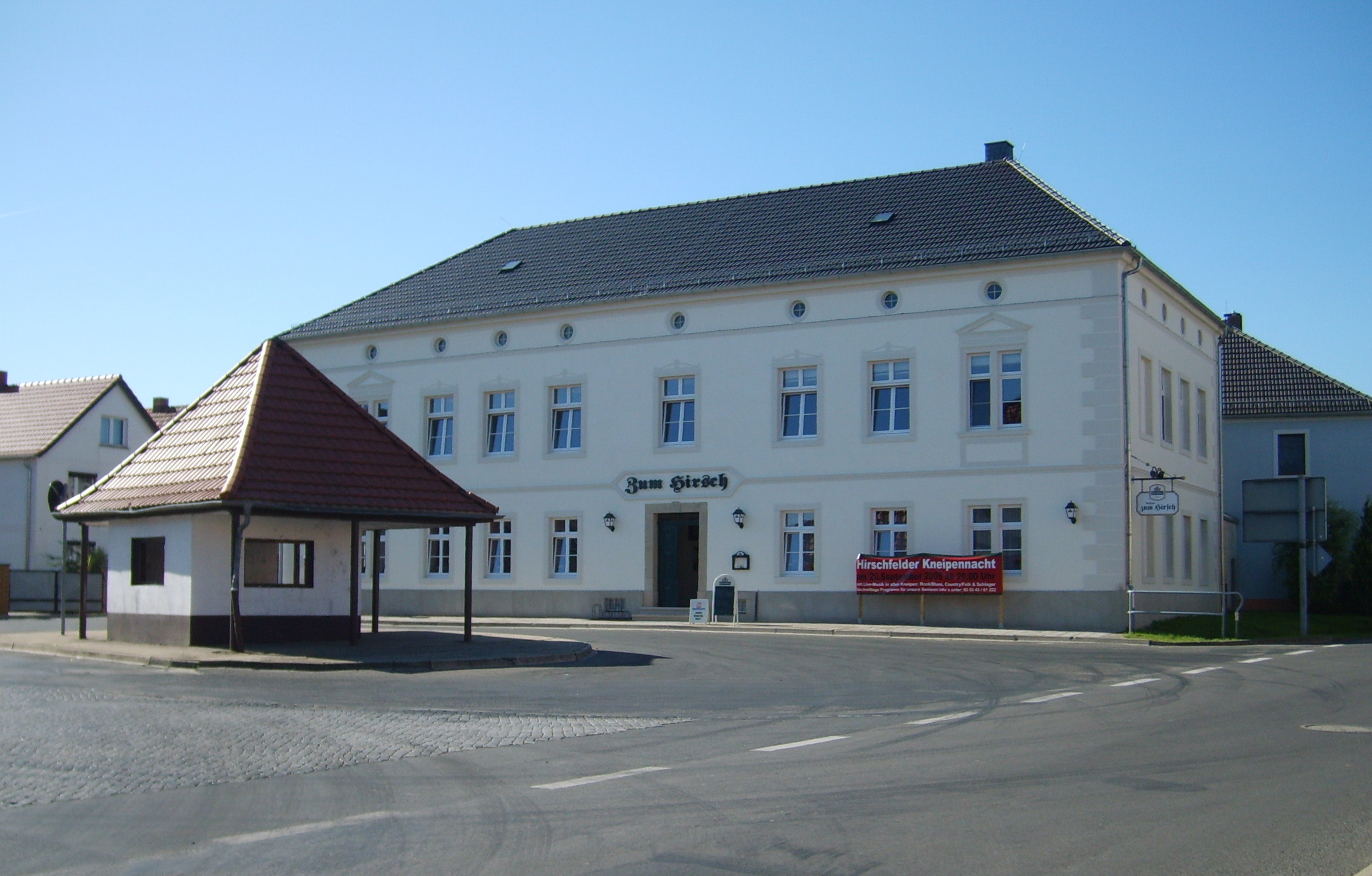 Hirschfeld